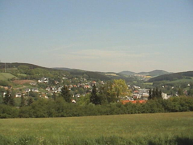 Blick auf Sundern, 19. Mai 2004.